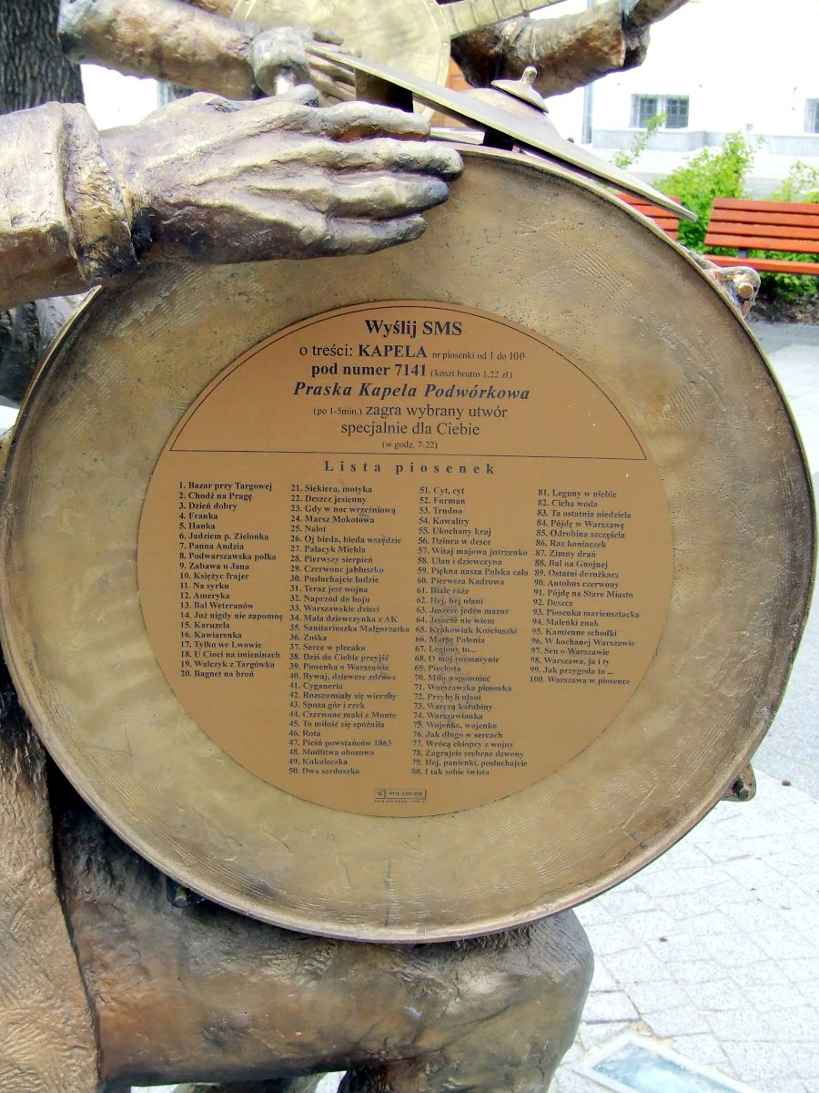 Kapela praska, wybór piosenek